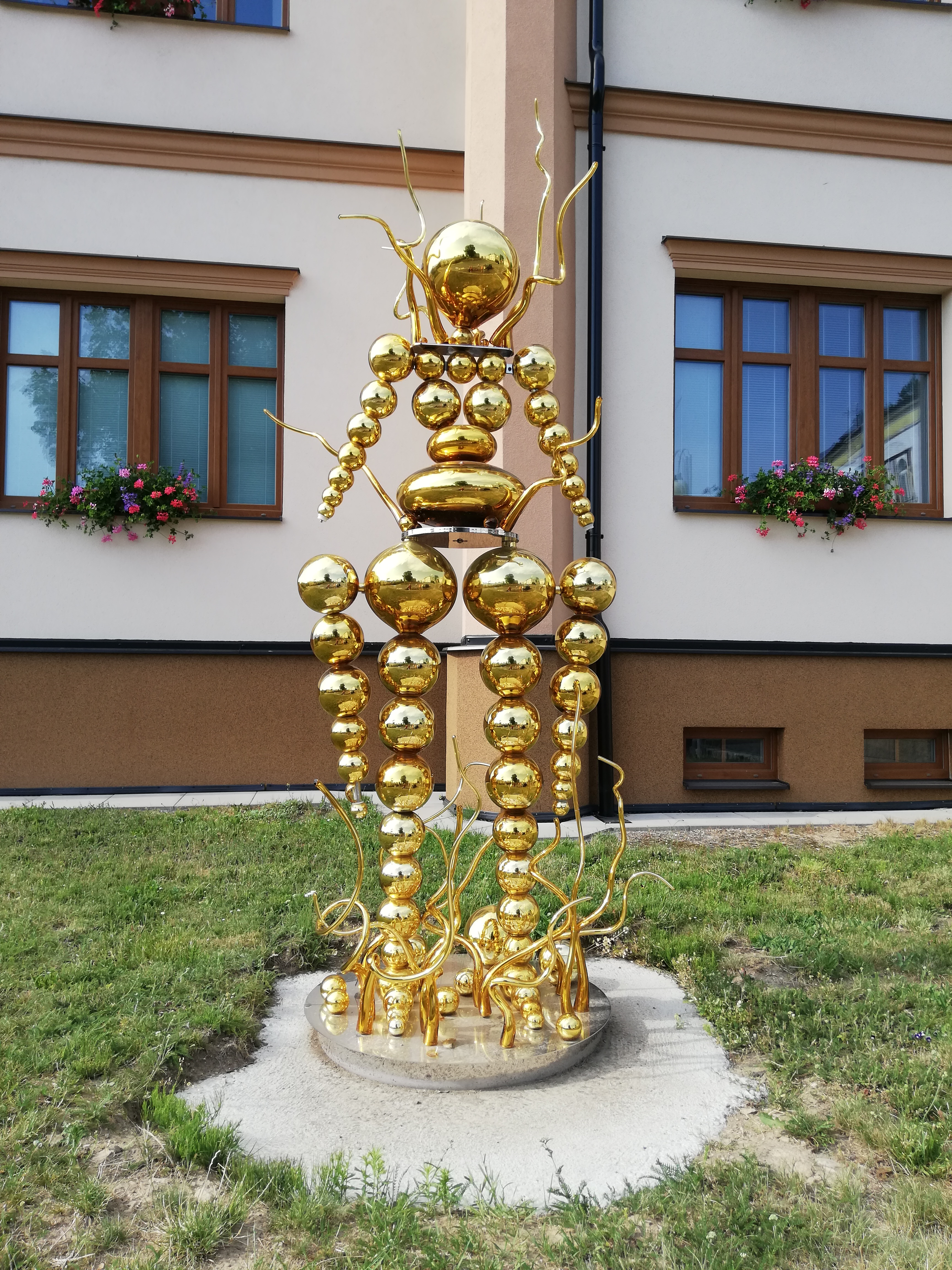 Crystal Gold Lady - skleněná figurální kompozice ve veřejném prostoru (před budovou městského úřadu) od Jiřího Šuhájka (* 14. dubna 1943, Pardubice) věnovaná společností „Preciosa“ městu Kamenický Šenov. Dílo vzniklo v roce 2018 ve sklárně Preciosa v průběhu Mezinárodního sklářského sympozia (IGS). Motto: „Malých věcí jsem už udělal mraky. Když člověk začíná pracovat se sklem, dovolí mu dělat jen malé prcky – sleničky, lahve, vázičky. Řekl jsem si, že musím vytvořit něco pořádného.“ (Jiří Šuhájek)